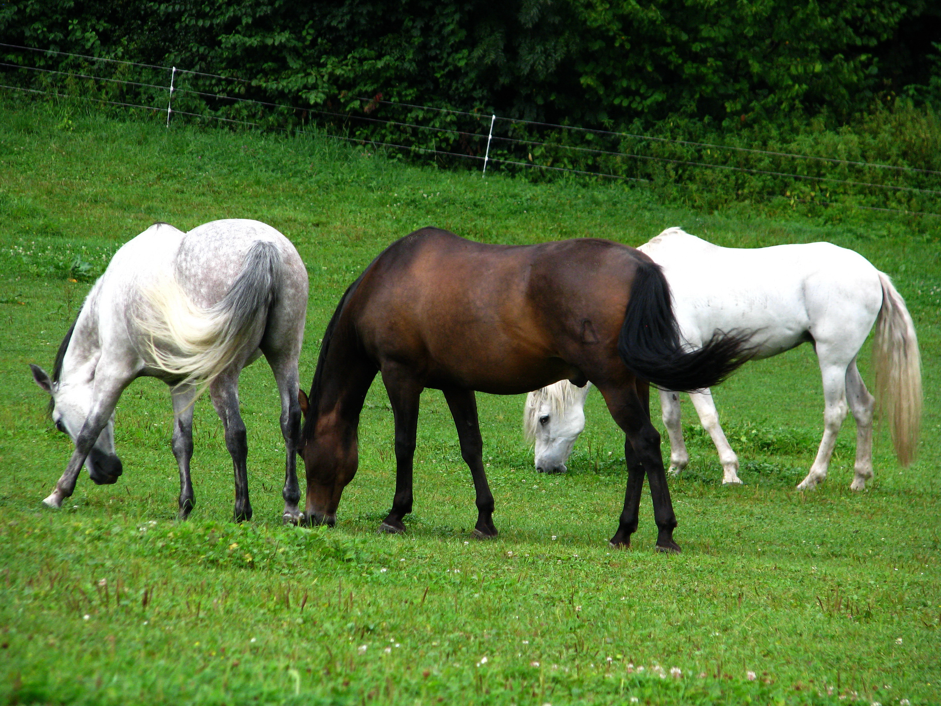 On Adlisberg near Gockhausen (Switzerland)